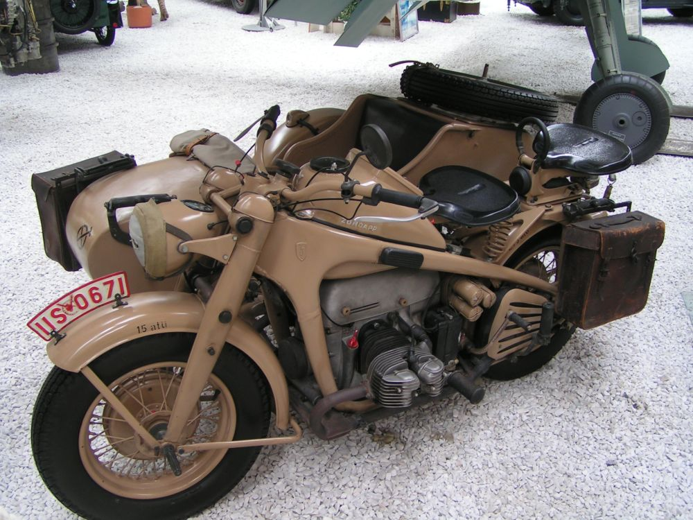 Zündapp KS 750, Technikmuseum Speyer